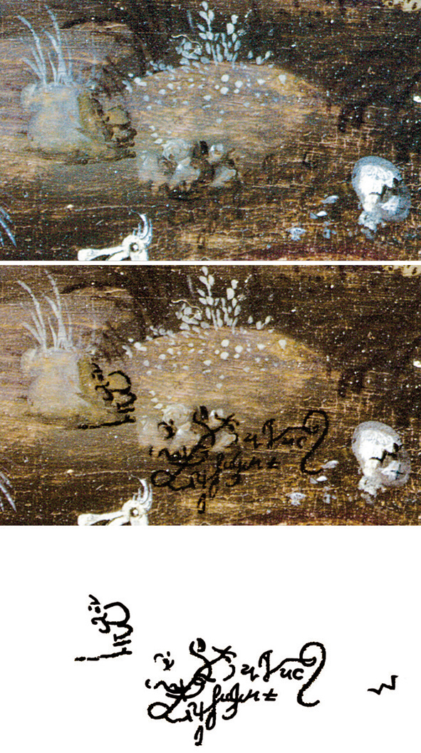 Identification des signatures (monogramme et cryptogramme) du Grand Œuvre de Leonardo par un algorithme de traitement d'images (seuillage et réseau de neurones) réalisée par l'Institut d'Optique de Palaiseau à partir d'une photographie infrarouge en fausses couleurs de l'IACC (Paris) et extraction partielle